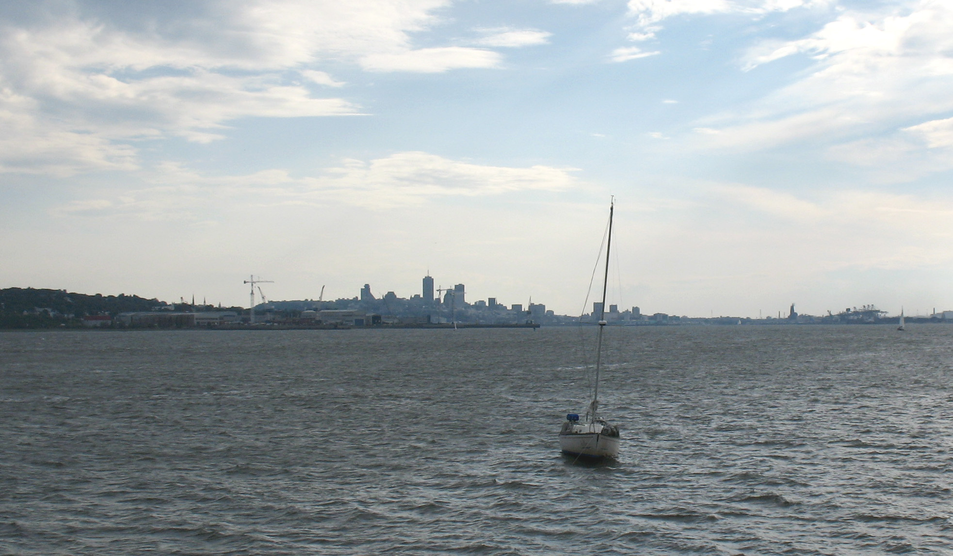 Québec vu de Sainte-Pétronille, Île d'Orléans, Province de Québec, Canada